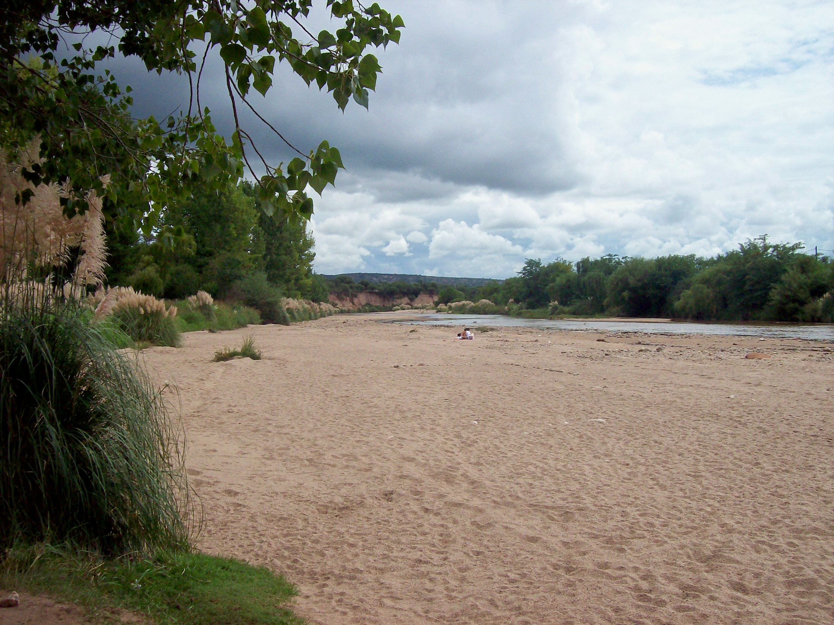 Balneario Las Maravillas en Villa Cura Brochero, provincia de Córdoba, Argentina.